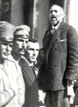 Nikolos Tschcheidse (russisch Nikolai Semjonowitsch Tschcheidse), menschewistischer Politiker, Rede in Petrograd, Russland, 1917